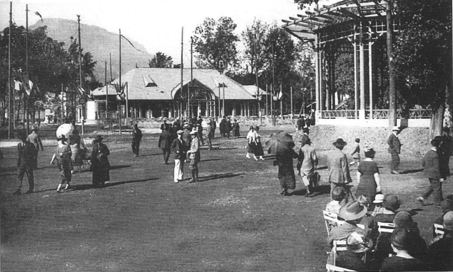 Kiosque à musique Armenonville à droite durant l'exposition internationale de la houille blanche et du tourisme à Grenoble (1925)